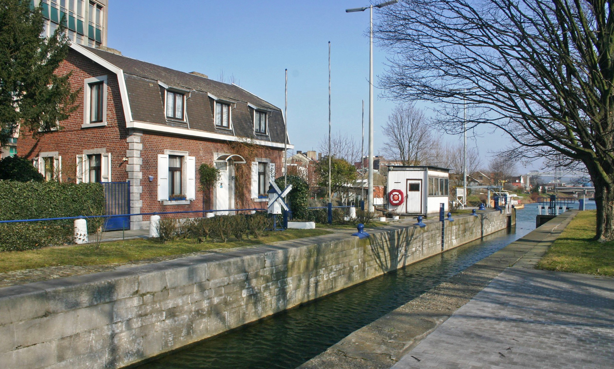 Schleis 1 mat Schleisewiechterhaischen